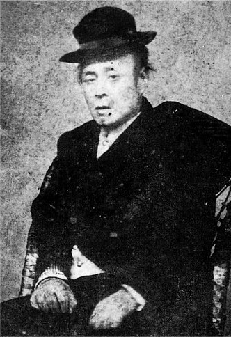 南部利義の肖像写真。